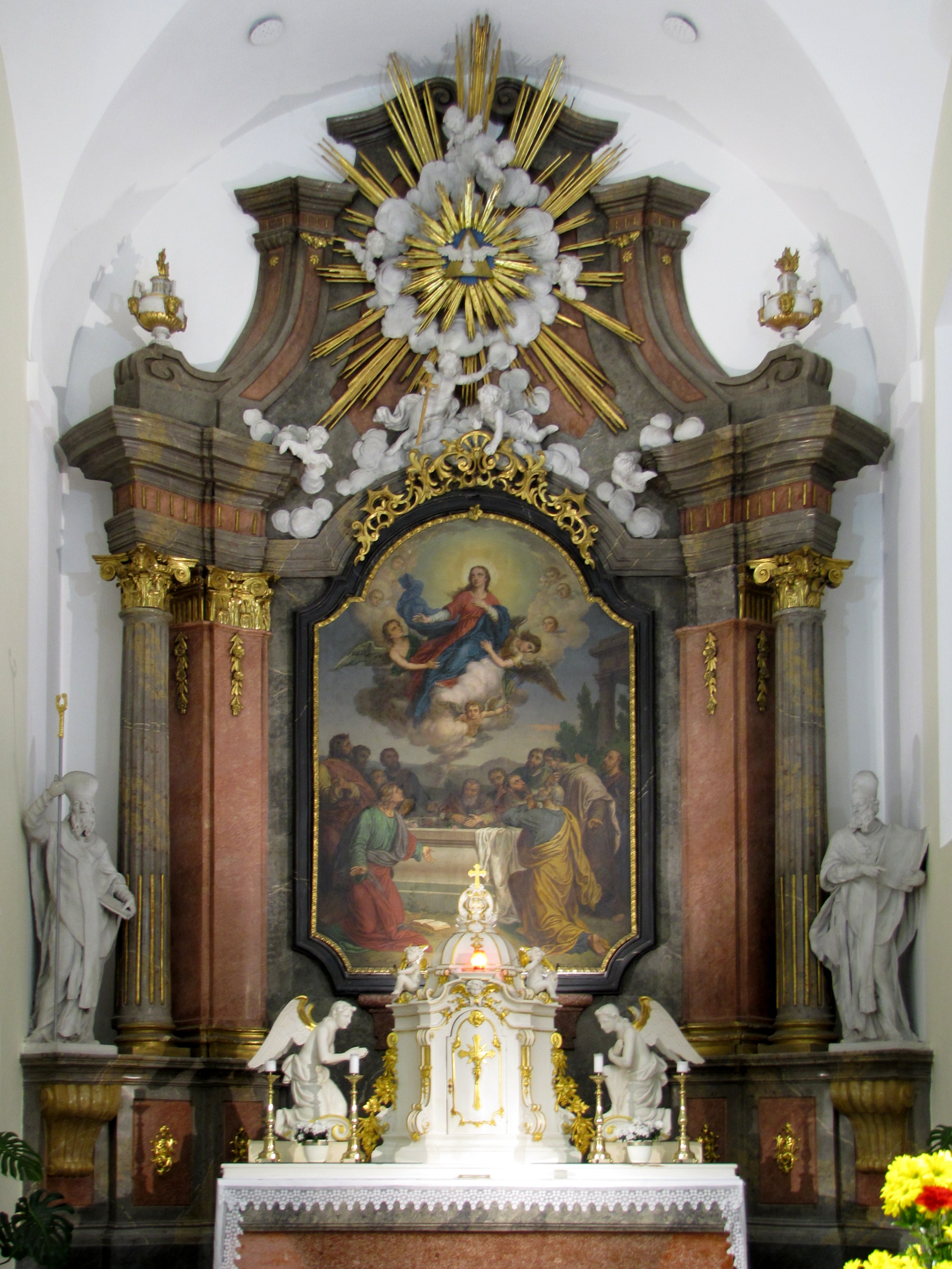 Oltářní obraz a retabulum v kostele Nanebevzetí Panny Marie v Kyjově. Sochy sv. Cyrila a Metoděje od brněnského sochaře Ondřeje Schweigla. Původní oltářní obraz od Antona Maulbertsche byl zničen a v roce 1880 nahrazen novým od malíře Josefa Zeleného.